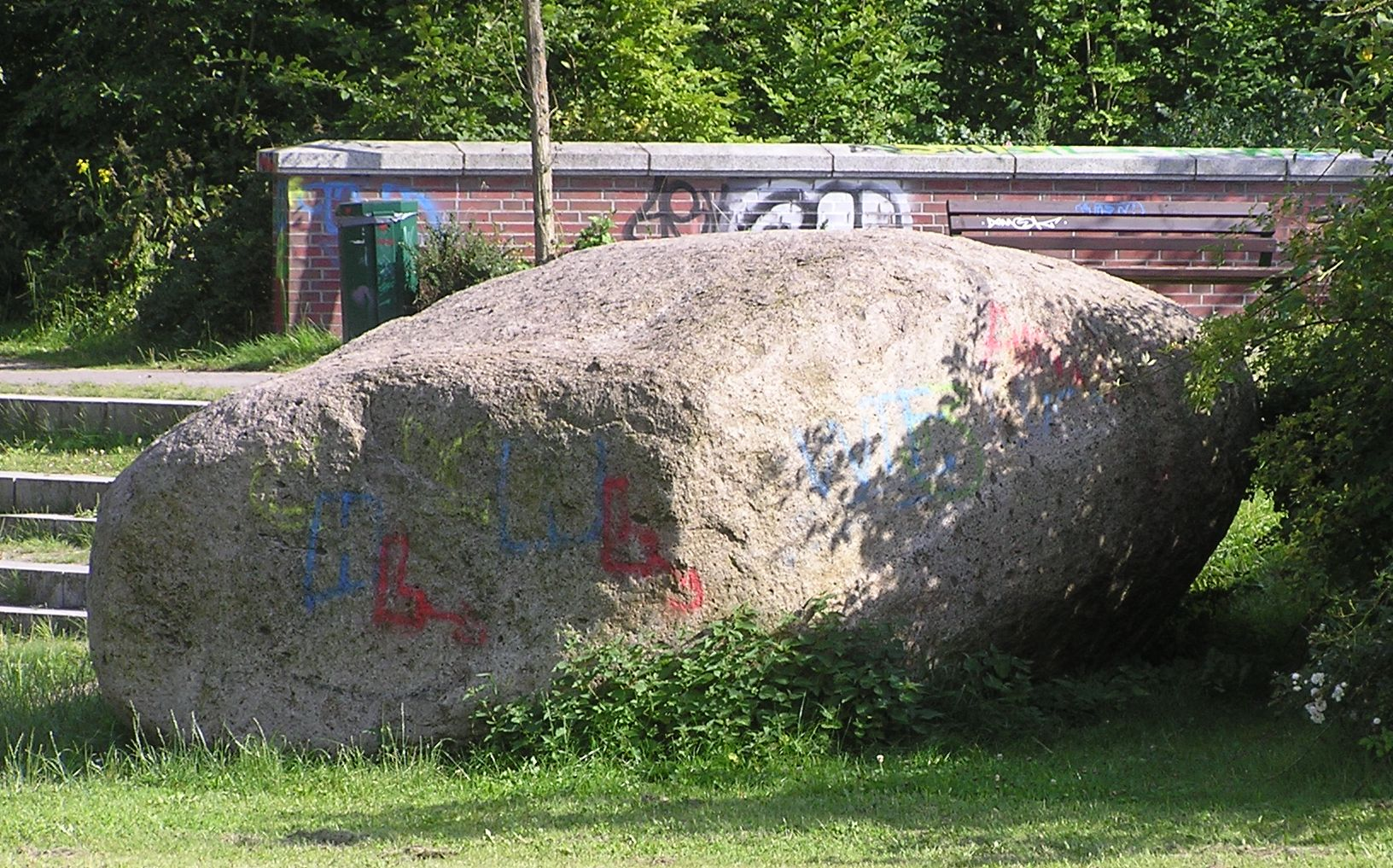 Findling: Stein von Ottensen (Stein von Othmarschen?), gefunden bei Elbtunnelerweiterung, Smålandgranit, Saale-Eiszeit